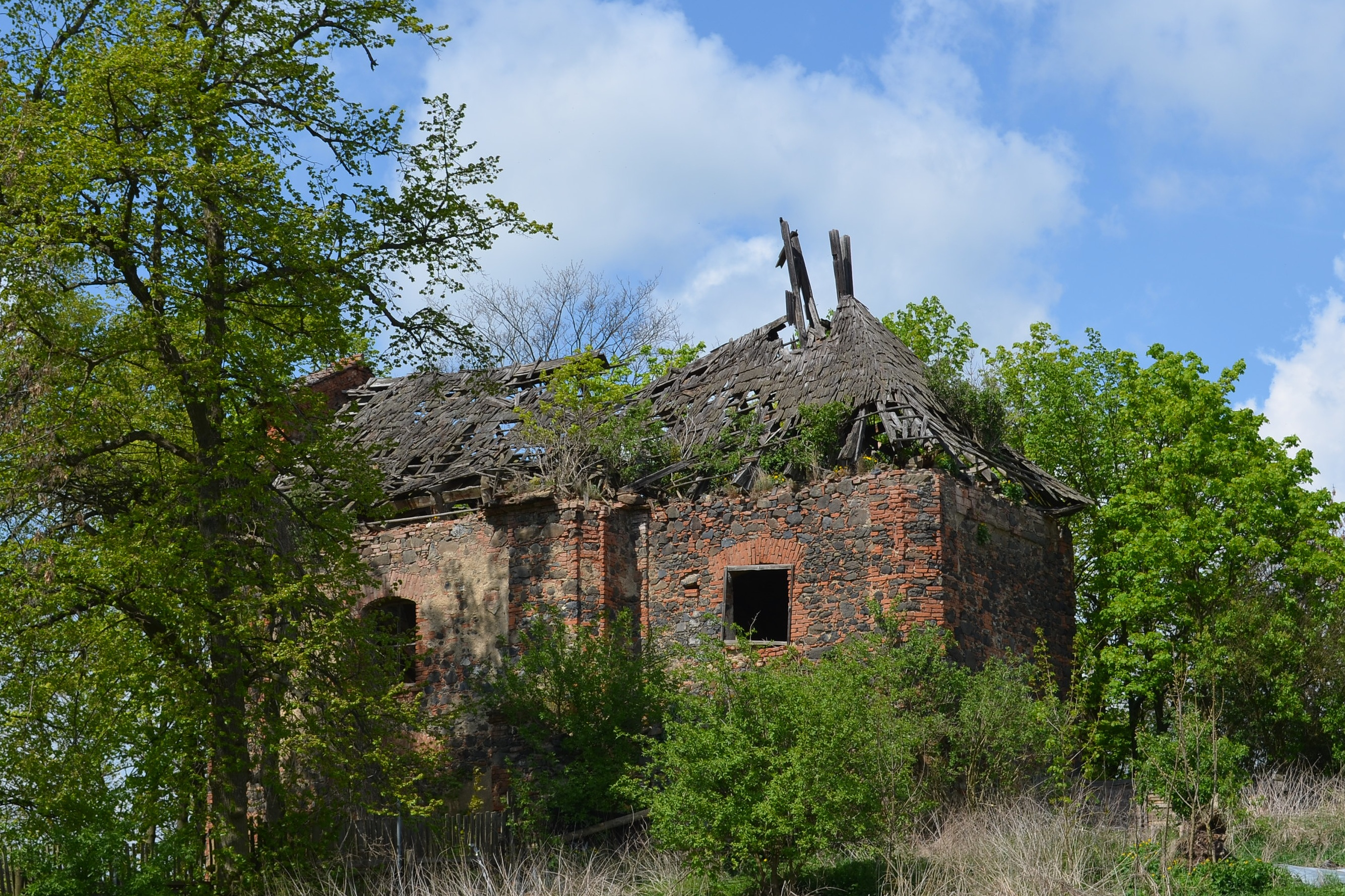 Kostel Nejsvětější Trojice, Verušičky.